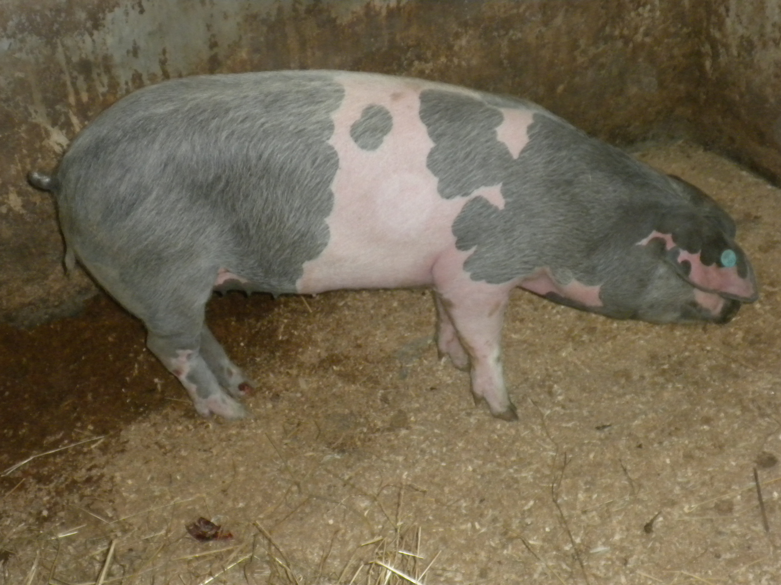 Gocha joven